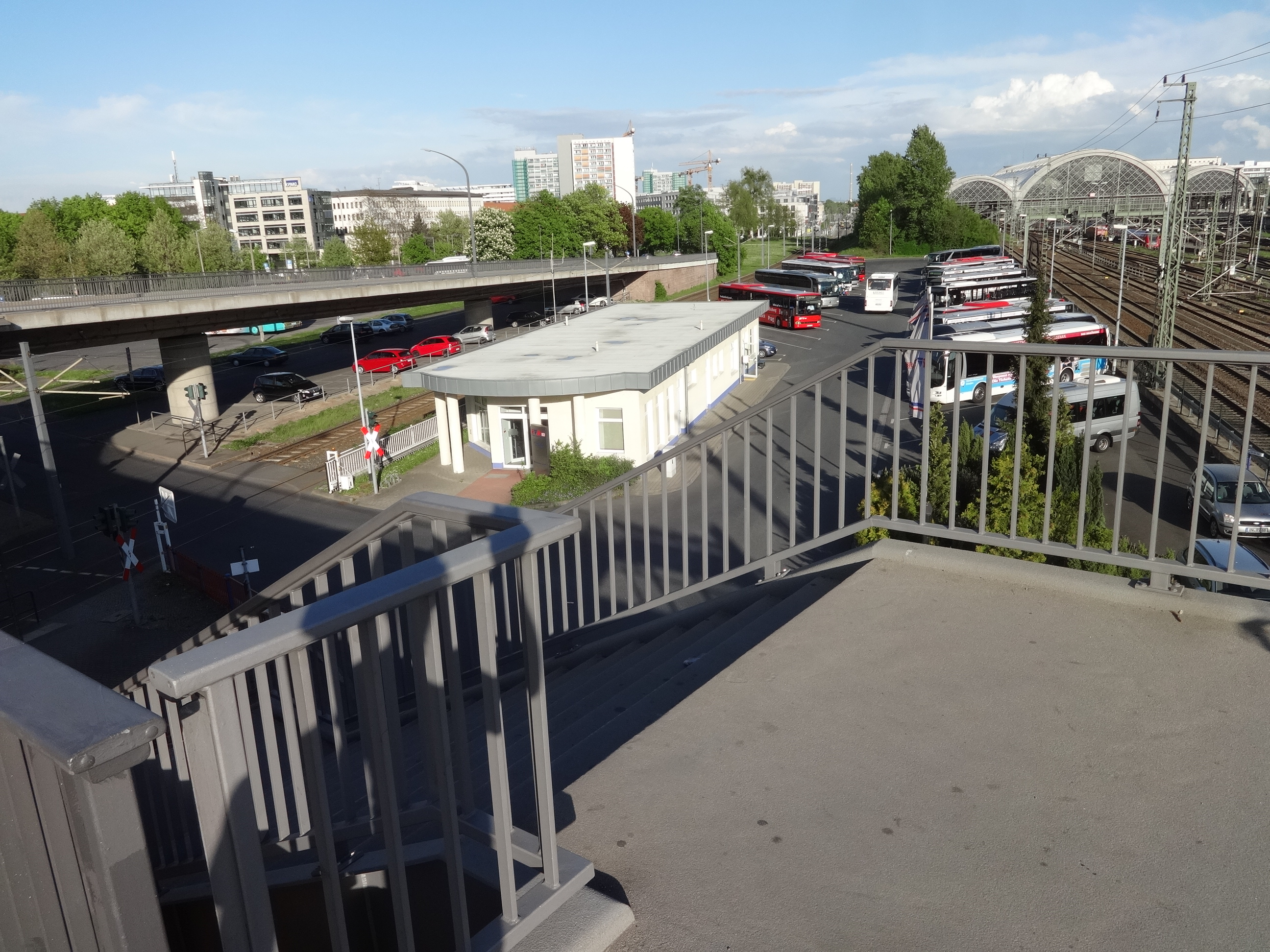 Betriebshof des Regionalverkehrs Dresden von der Brücke Budapester Straße aus gesehen; links die südöstliche KFZ-Rampe; davor die Fußgängertreppe; rechts der Dresdner Hauptbahnhof